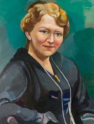 Ljósmynd tekin af málverki í eigu bræðranna Halldórs Jónssonar (Bjarnason) og Ólafs J. Bjarnason sem þeir gáfu Alþingi til eignar